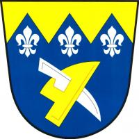 Znak obce Heřmaneč